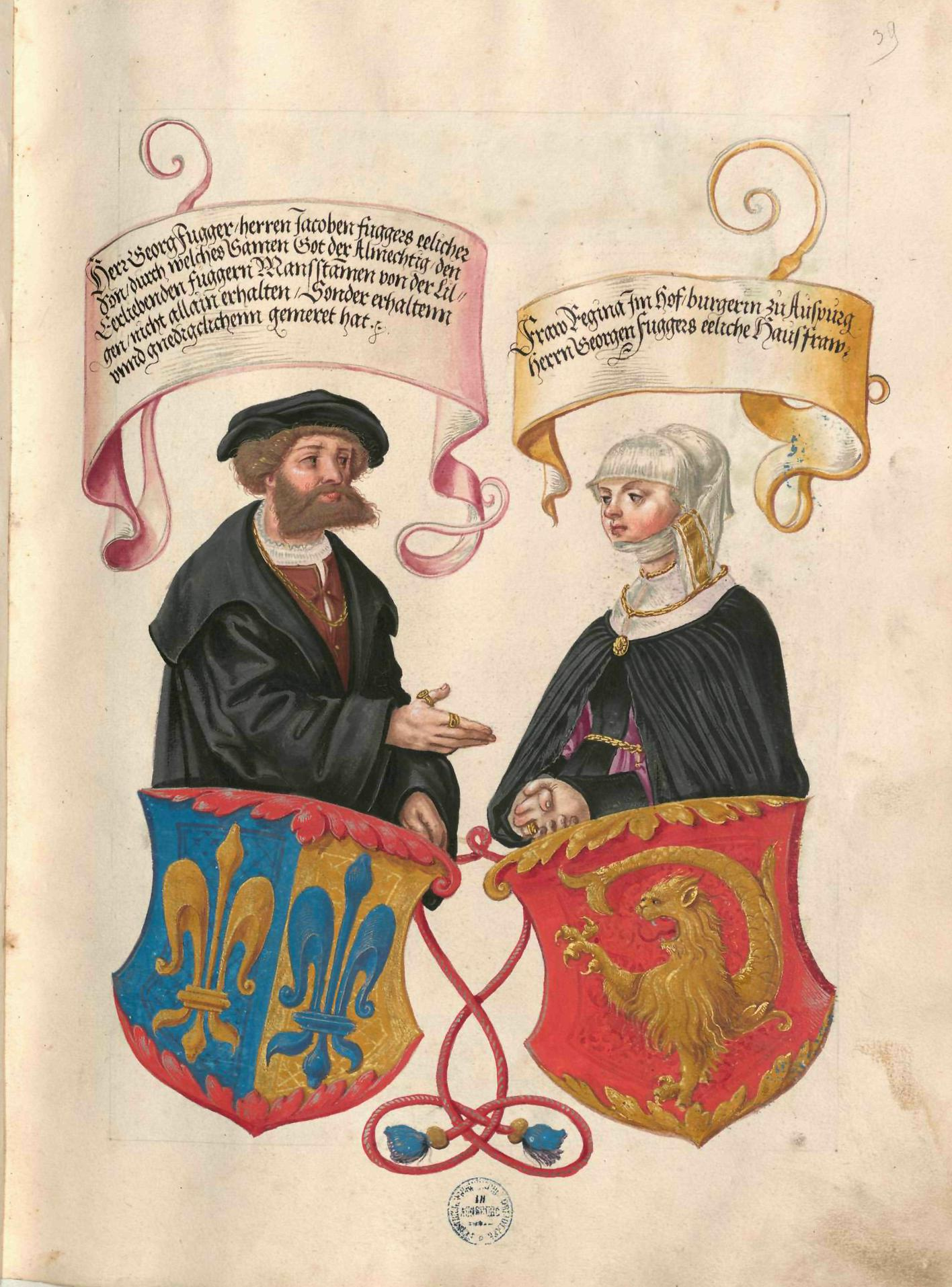 Geheimes Ehrenbuch der Fugger, hergestellt in der Werkstatt Jörg Breu d. J., 1545–1549 Portrait- und Wappendarstellung